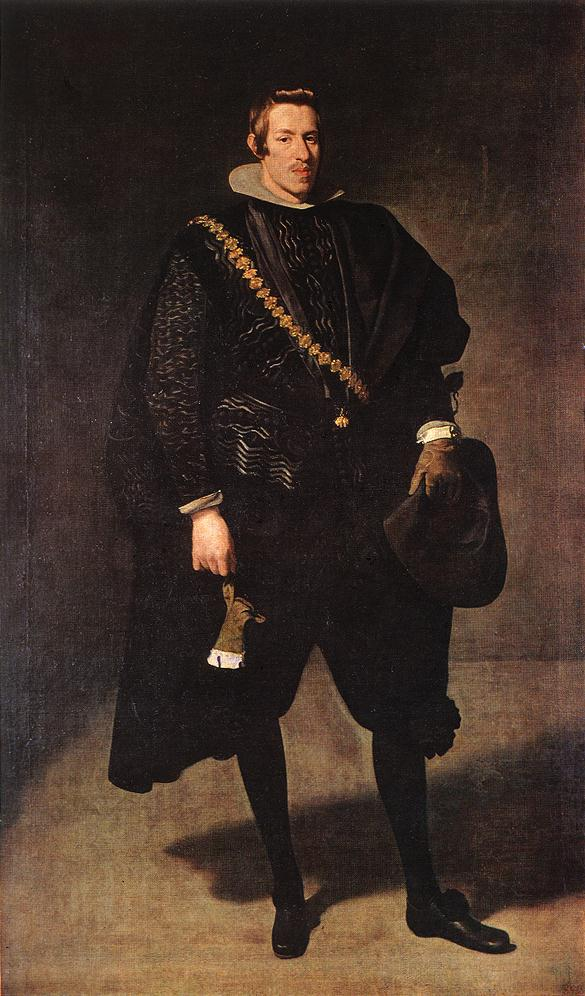 Retrato del infante Carlos de Austria (1607-1632), que fue hijo del rey Felipe III de España y de la reina Margarita de Austria.